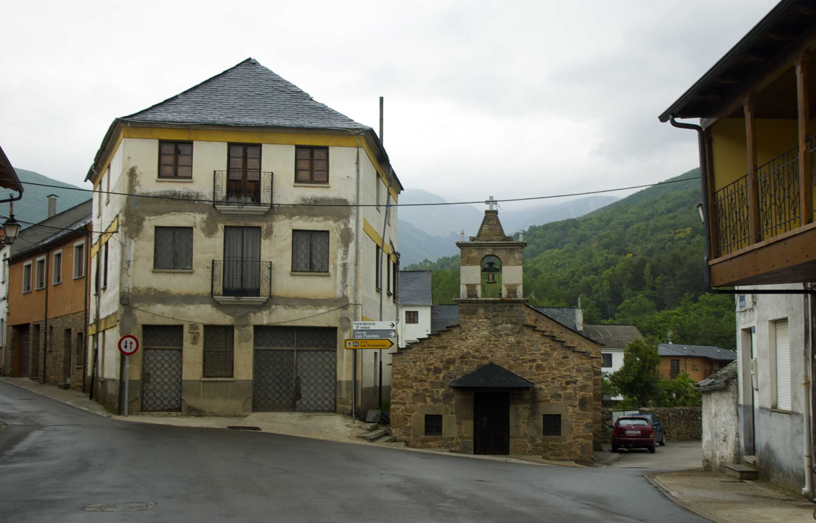 Noceda del Bierzo, municipio de León, España.